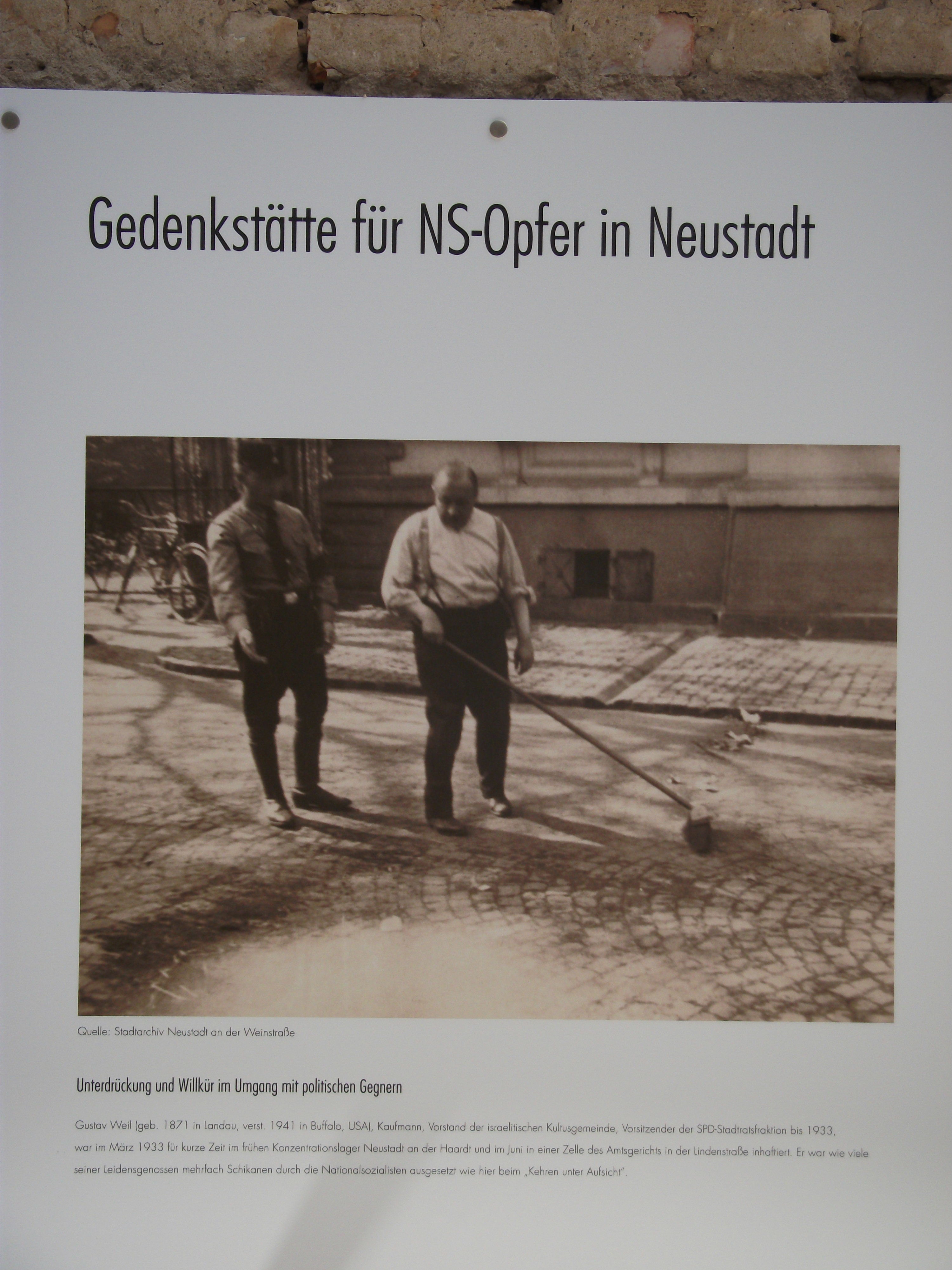 Infotafel des Foerdervereins Gedenkstaette mit einem Foto aus dem Stadtarchiv von Neustadt an der Weinstraße. Das Foto, aufgenommen 1933, zeigt Gustav Weil, den Vorsitzenden der Stadtratsfraktion der SPD, zusammen mit einem Bewacher beim erzwungenen Straßenkehren.